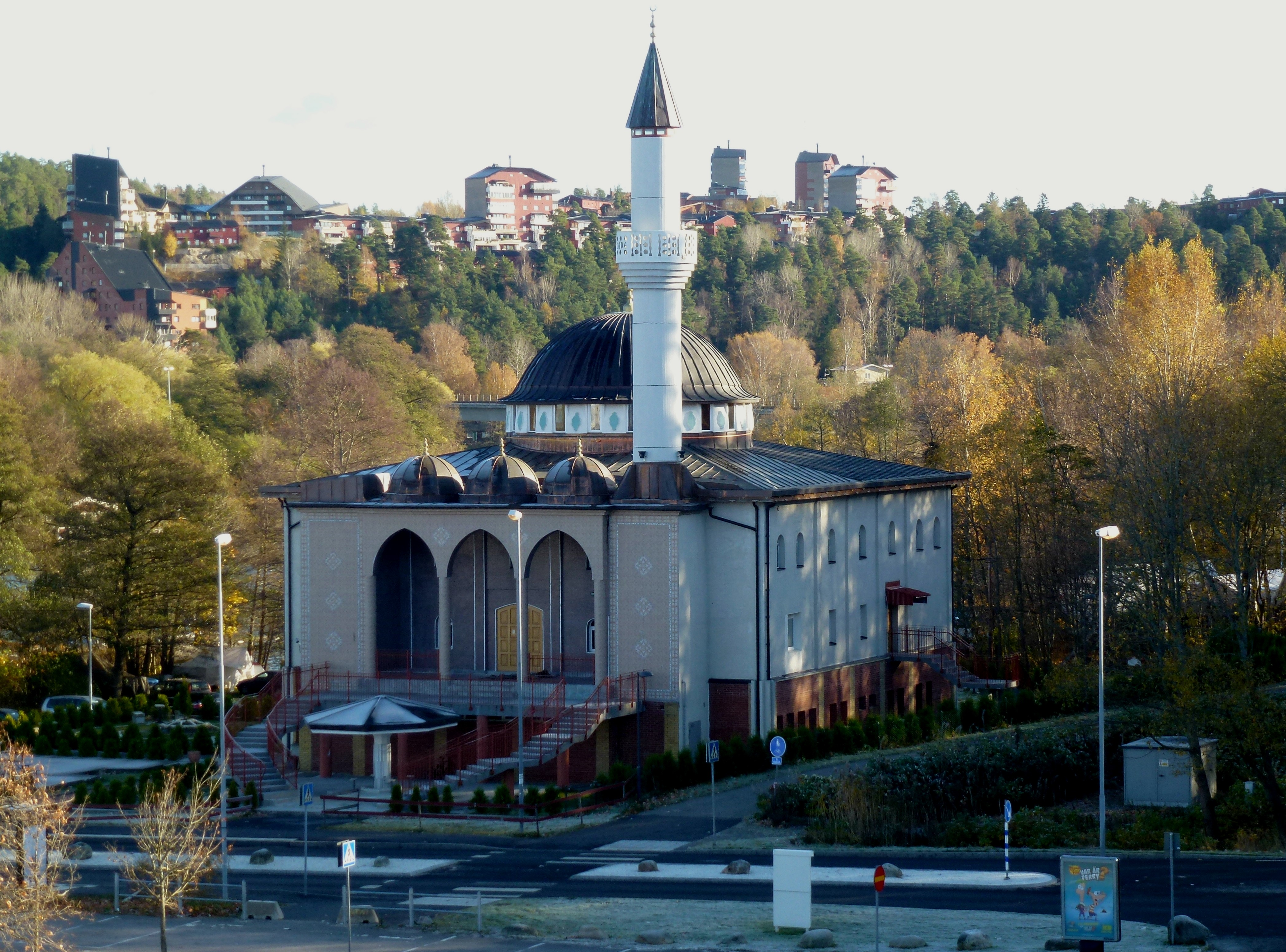 Fittja moske